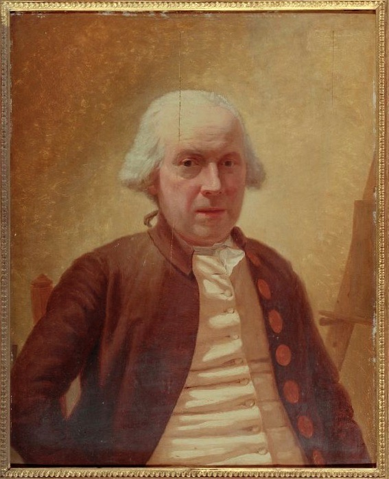 Léonard Defrance (1735–1805): Selbstporträt. Öl auf Holz, 70 x 55 cm. Musée de l’Art wallon, Lüttich.